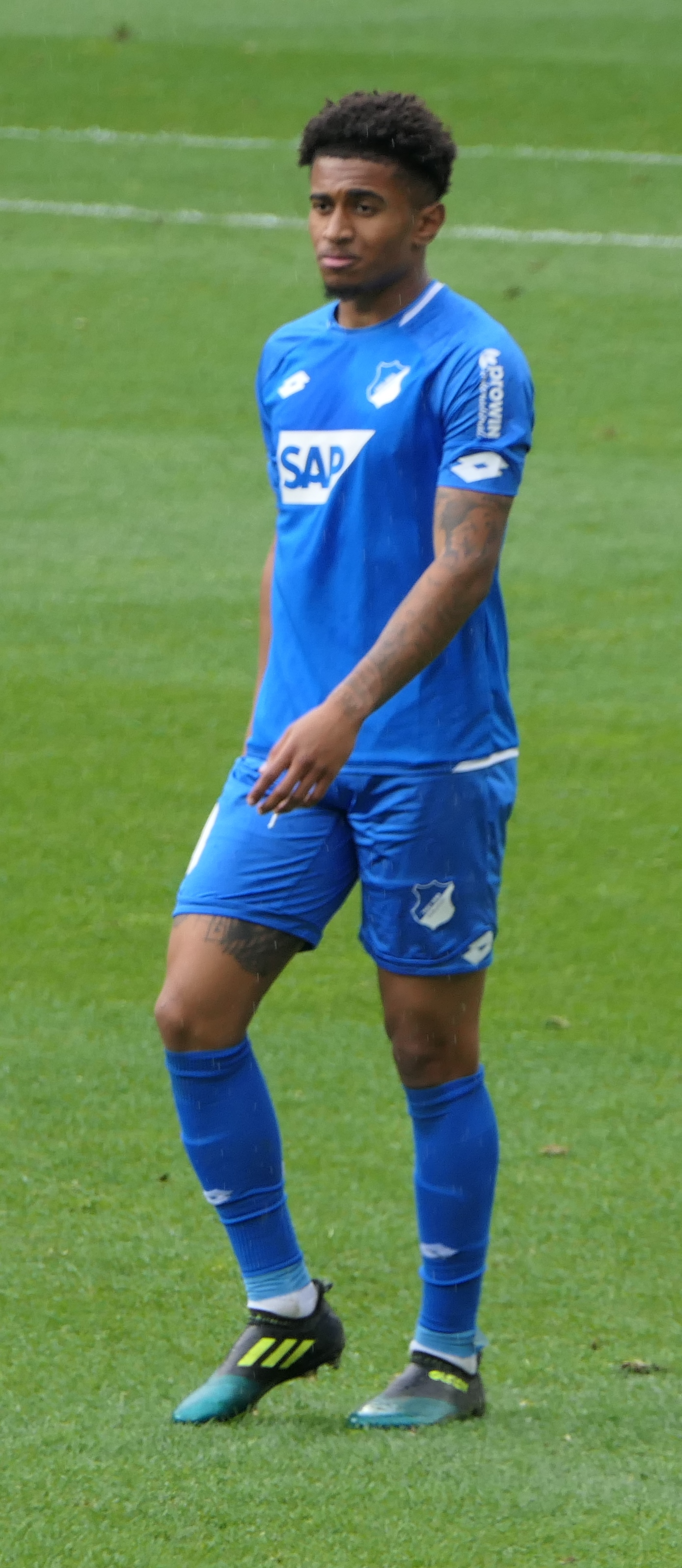 Der Fussballprofi Reiss Nelson im Trikot der TSG 1899 Hoffenheim beim Heimspiel gegen den SV Werder Bremen am 11.05.2019.